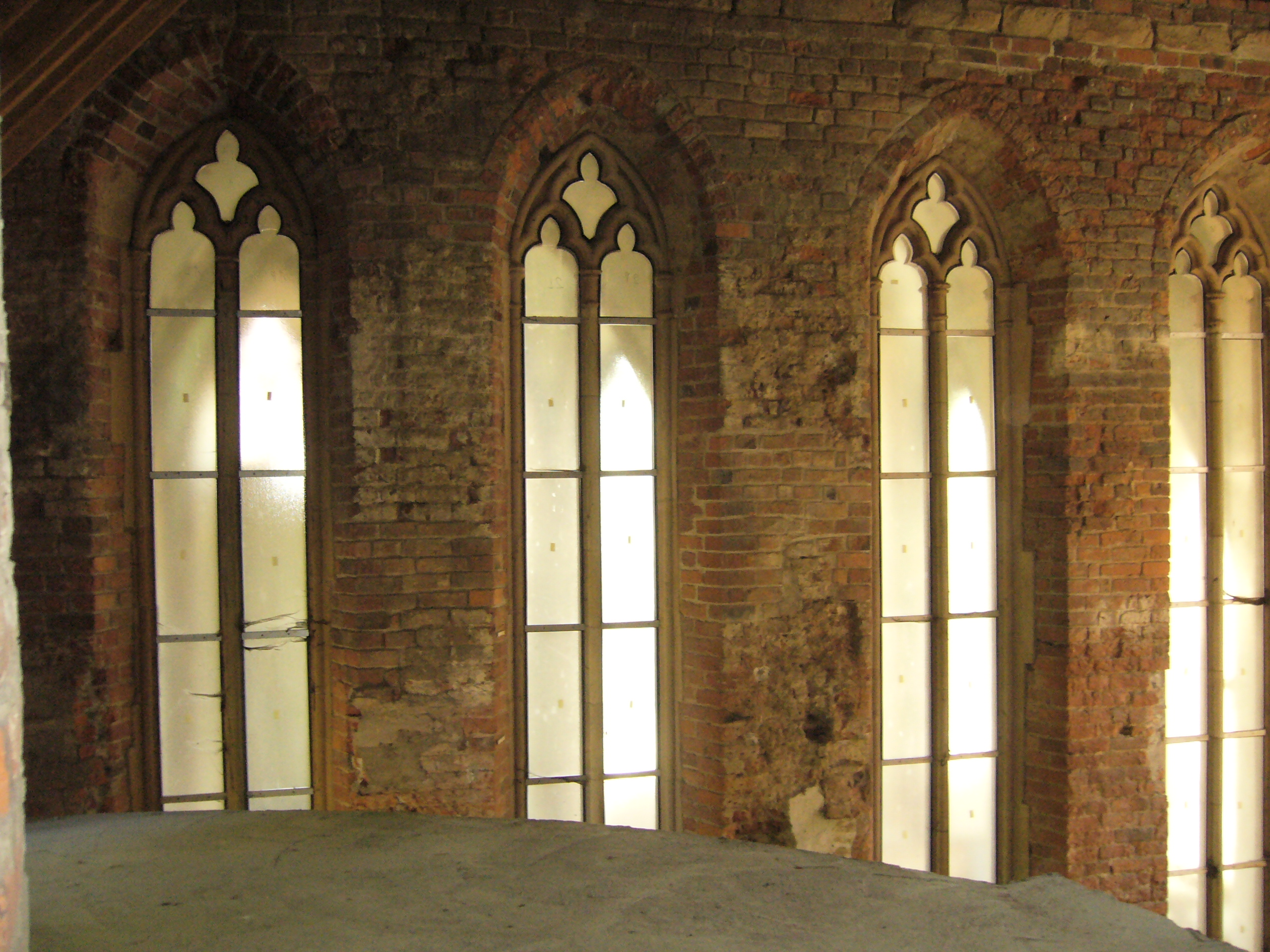 Kaplica zamkowa w Raciborzu. Okna w ścianie północnej kaplicy wychodzące do wnętrz zamkowych, widok z pomieszczenia na piętrze zamku